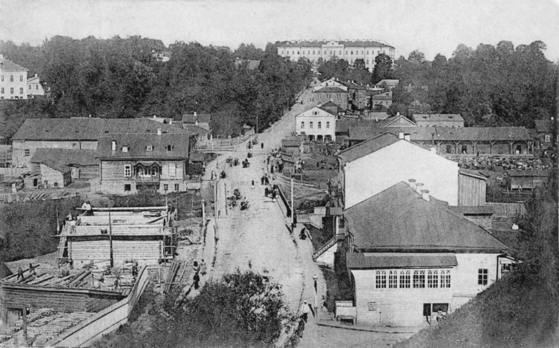 Від на Быхаўскую вуліцу